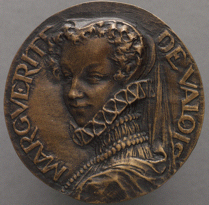 Marguerite de Volois, bronzo, diam. 5.4 cm., Musée d'Orsay, Paris